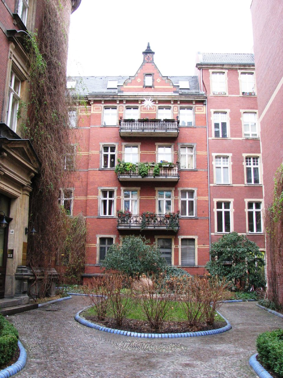 Lola's Apartment